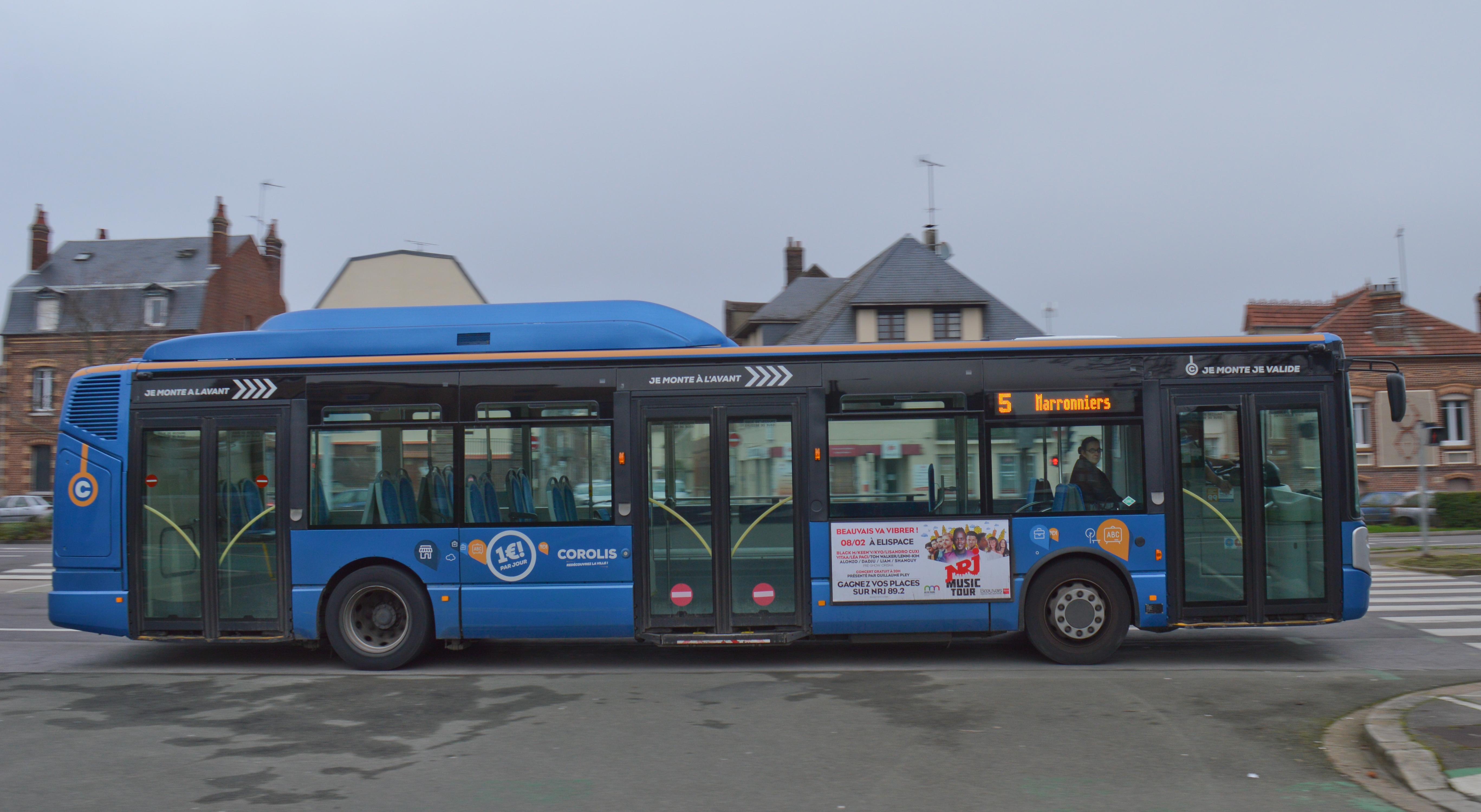 Un Irisbus Citelis 12 GNV sur la ligne 5 du réseau Corolis